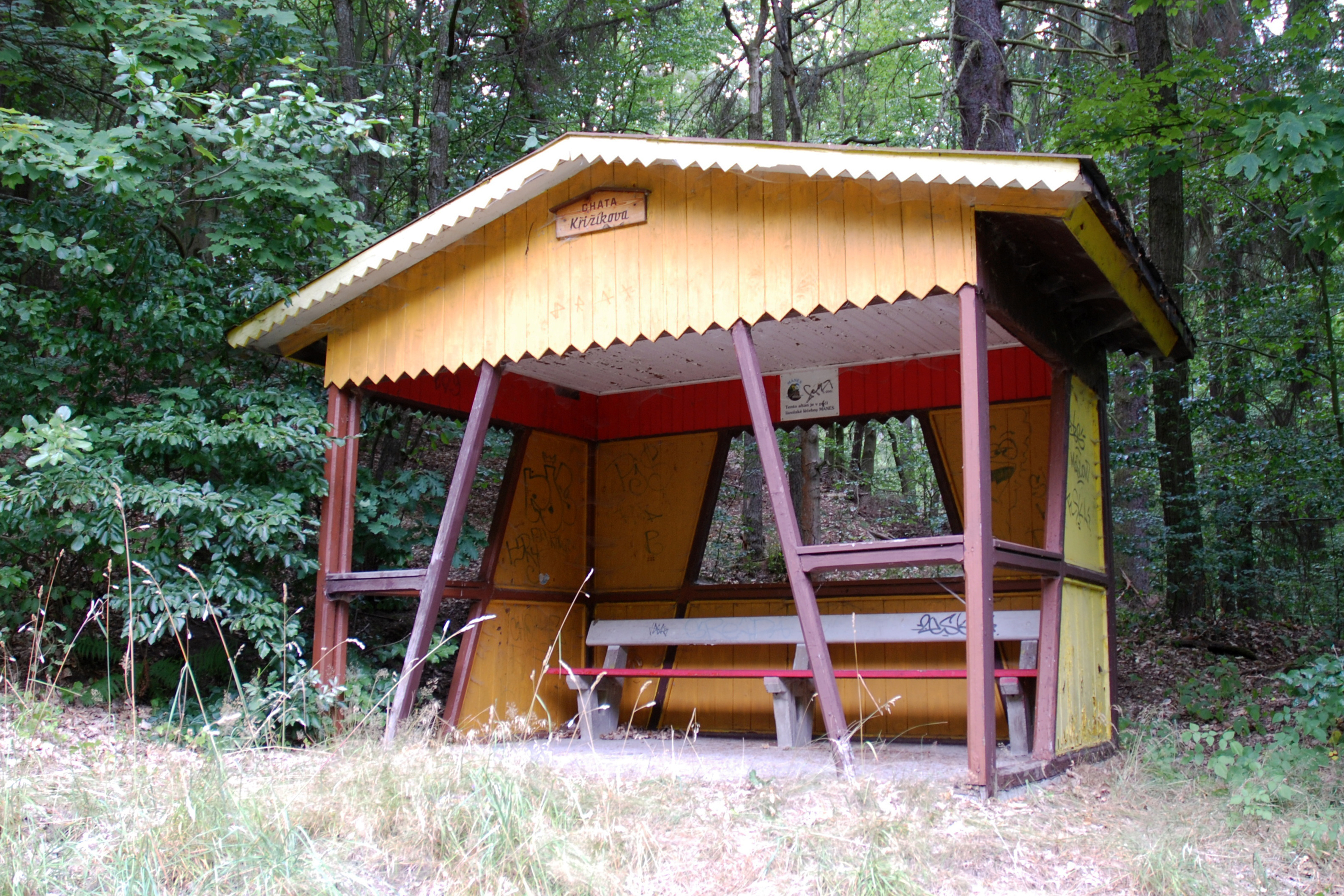 Křižíkova chata v karlovarských lázeňských lesích